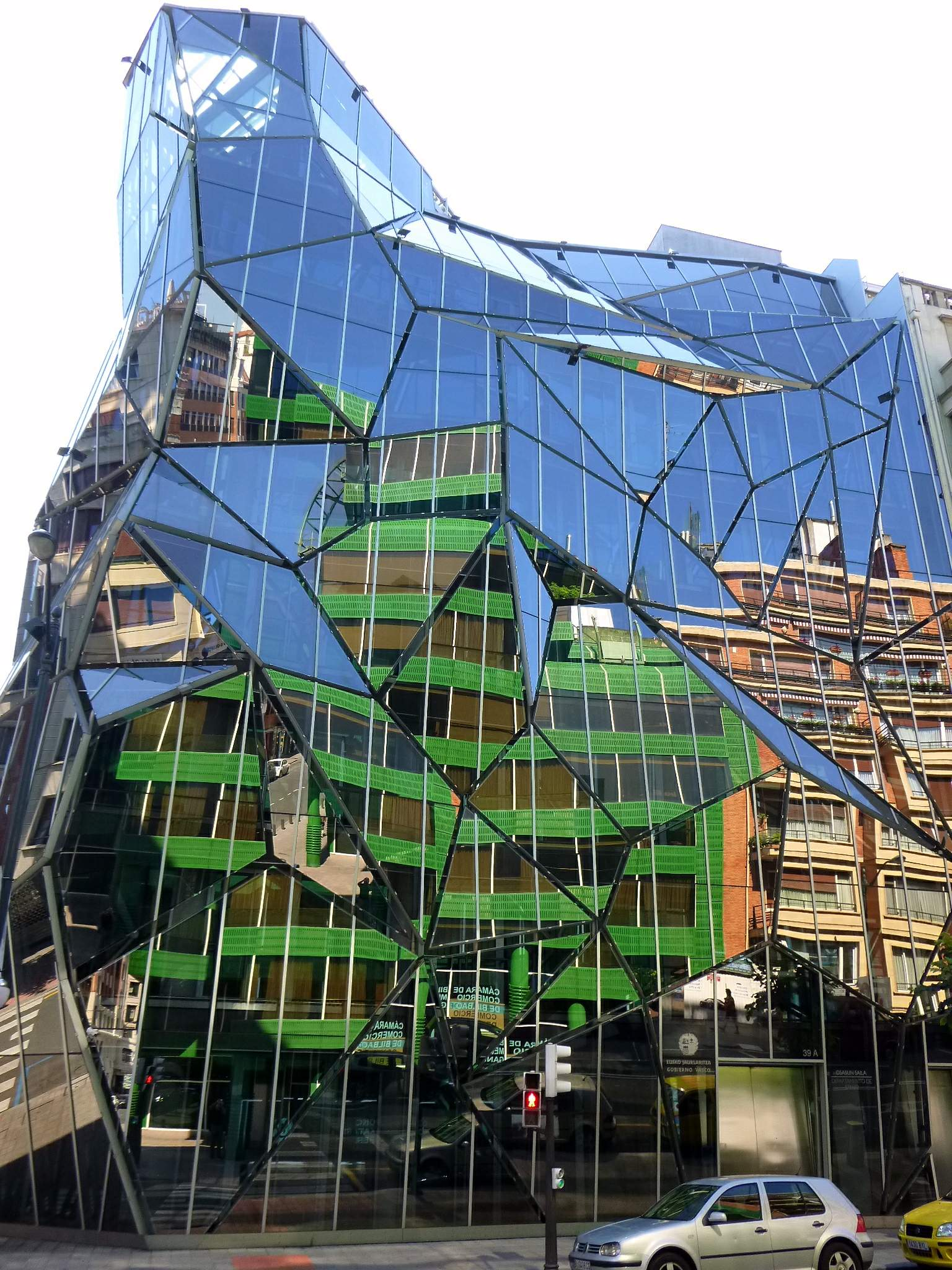 Sede de Osakidetza en Bilbao